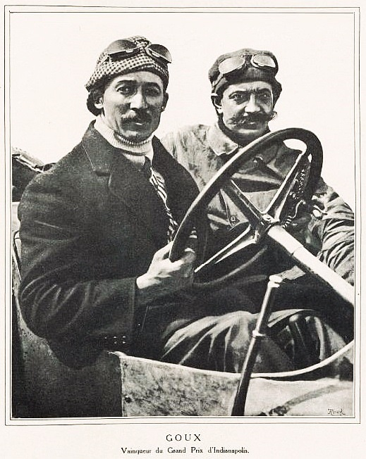 Jules Goux vainqueur des 500 miles d'Indianapolis (La Vie au Grand Air, 14 juin 1913, p.455)